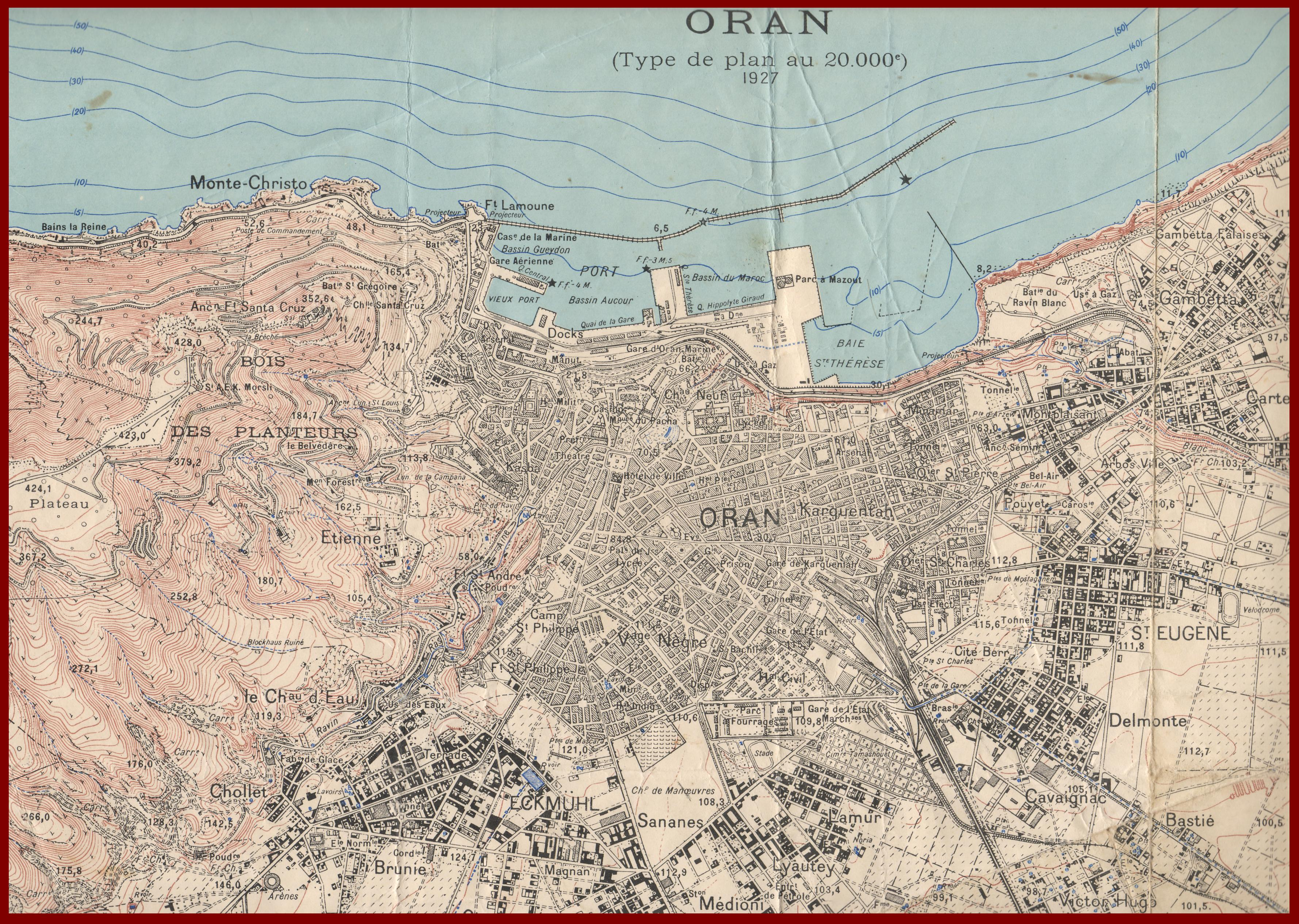 Plan topographique d'Oran, ville de l'ouest algérien - 1927